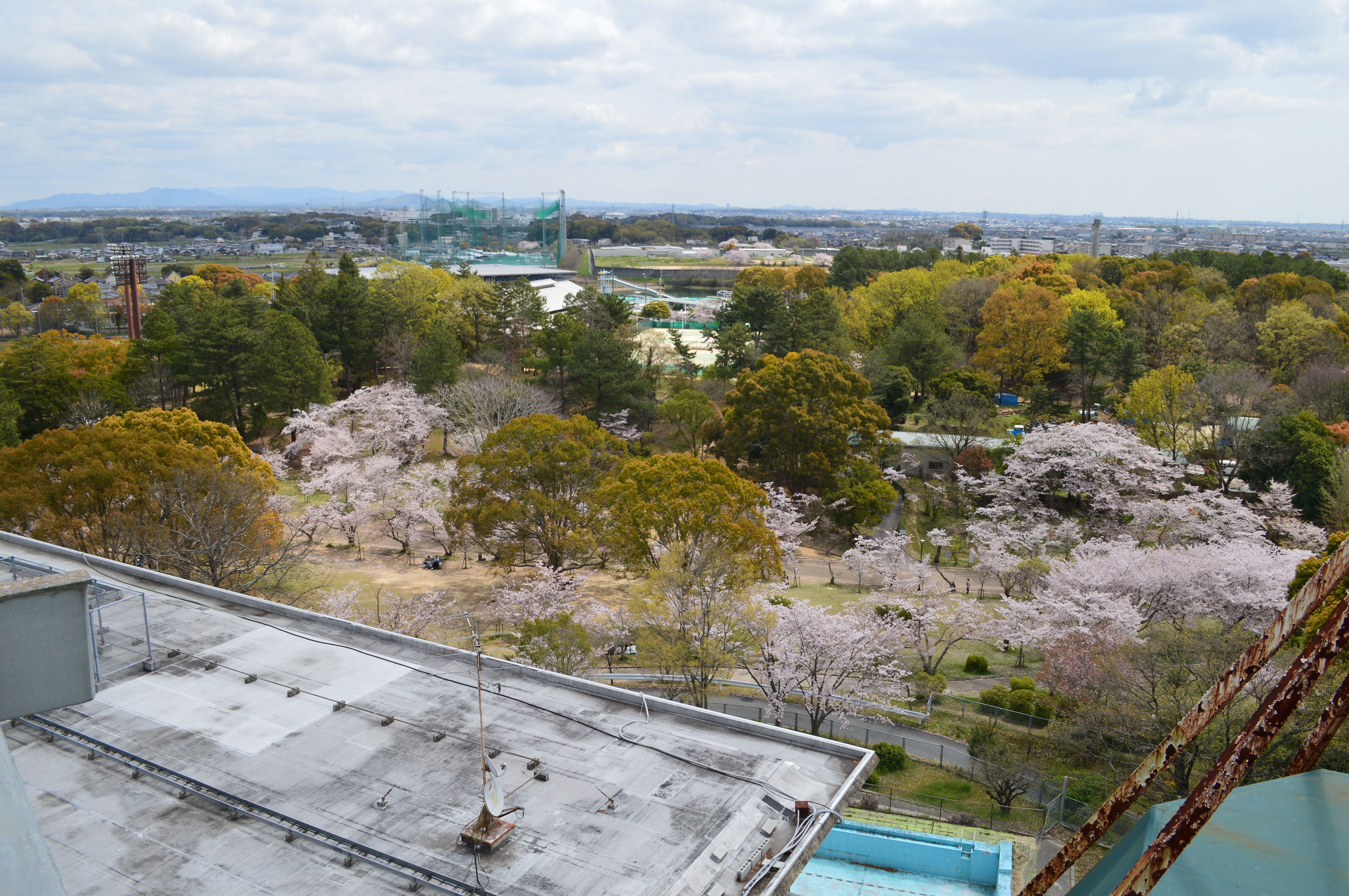 日岡山古墳群 概観